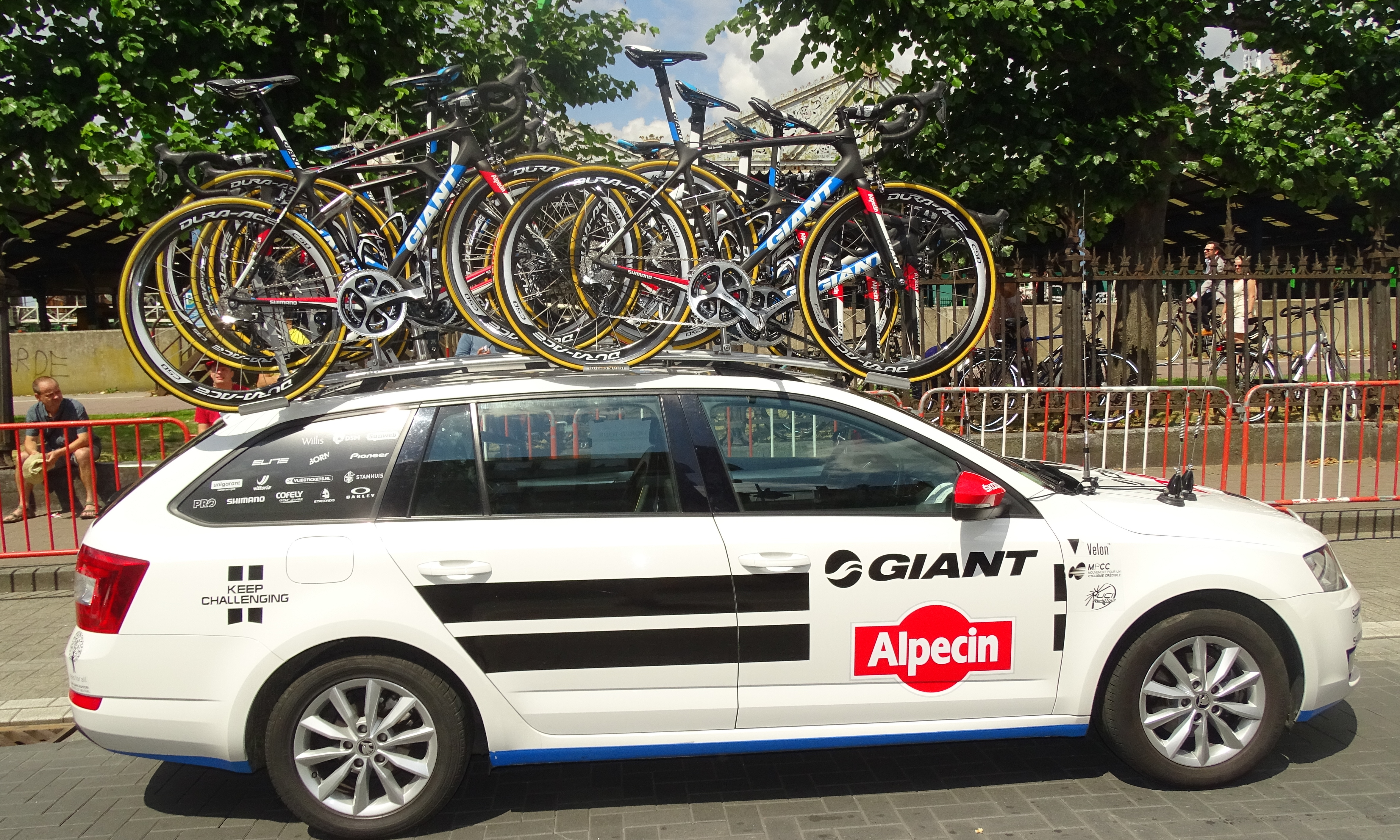 Reportage réalisé le lundi 6 juillet à l'occasion du départ de la troisième étape du Tour de France 2015 à Anvers, Belgique.